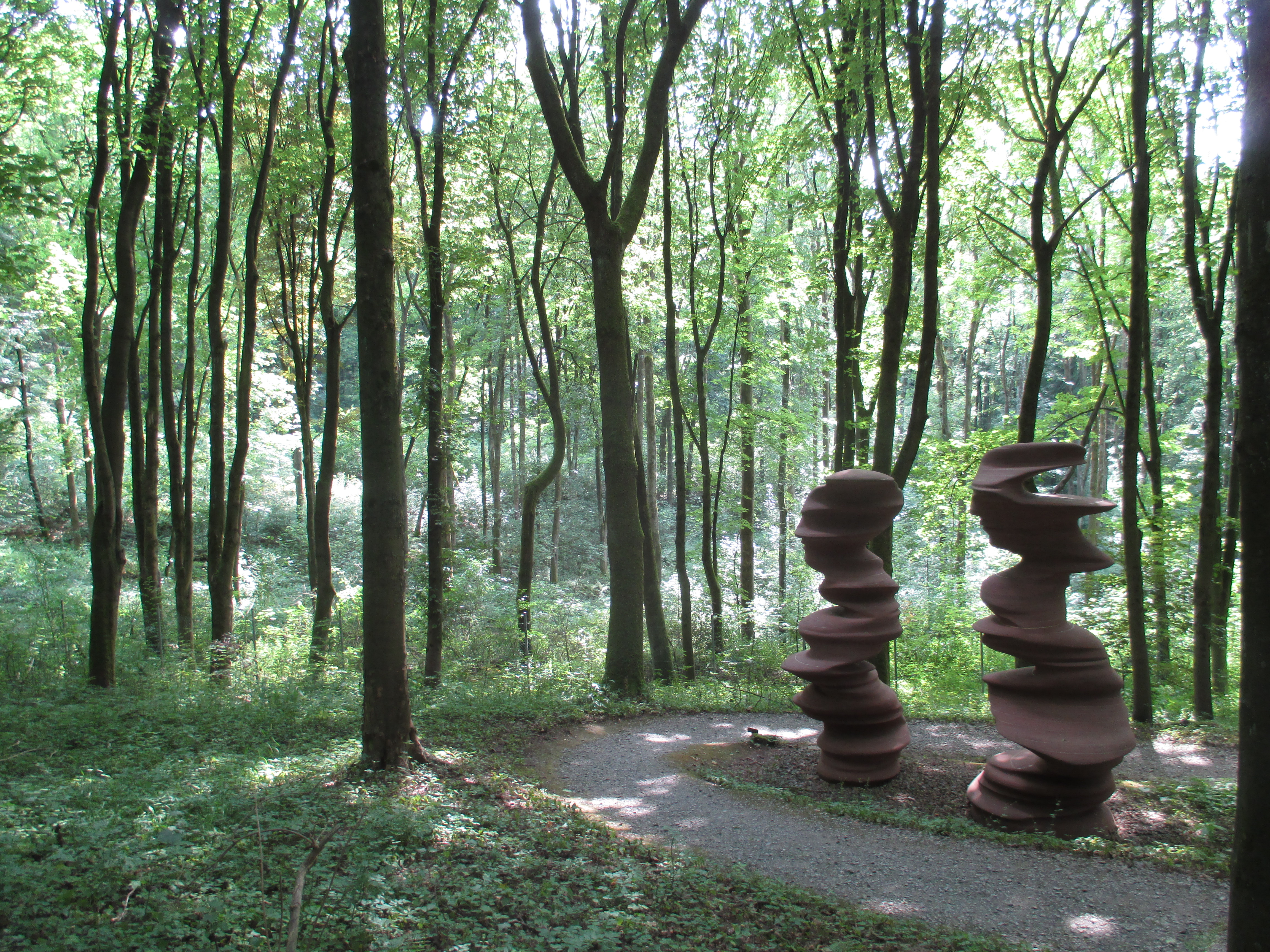 Skulpturenpark Waldfrieden: Steinerne Wanderer im Bergahornwald - "Here Today, Gone Tomorrow" (2002) von Tony Cragg.